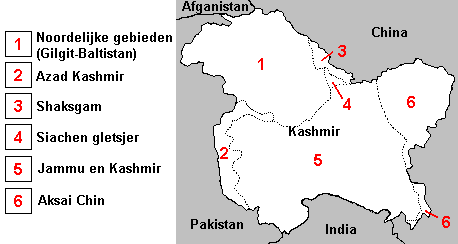 Herbewerking van en-wiki